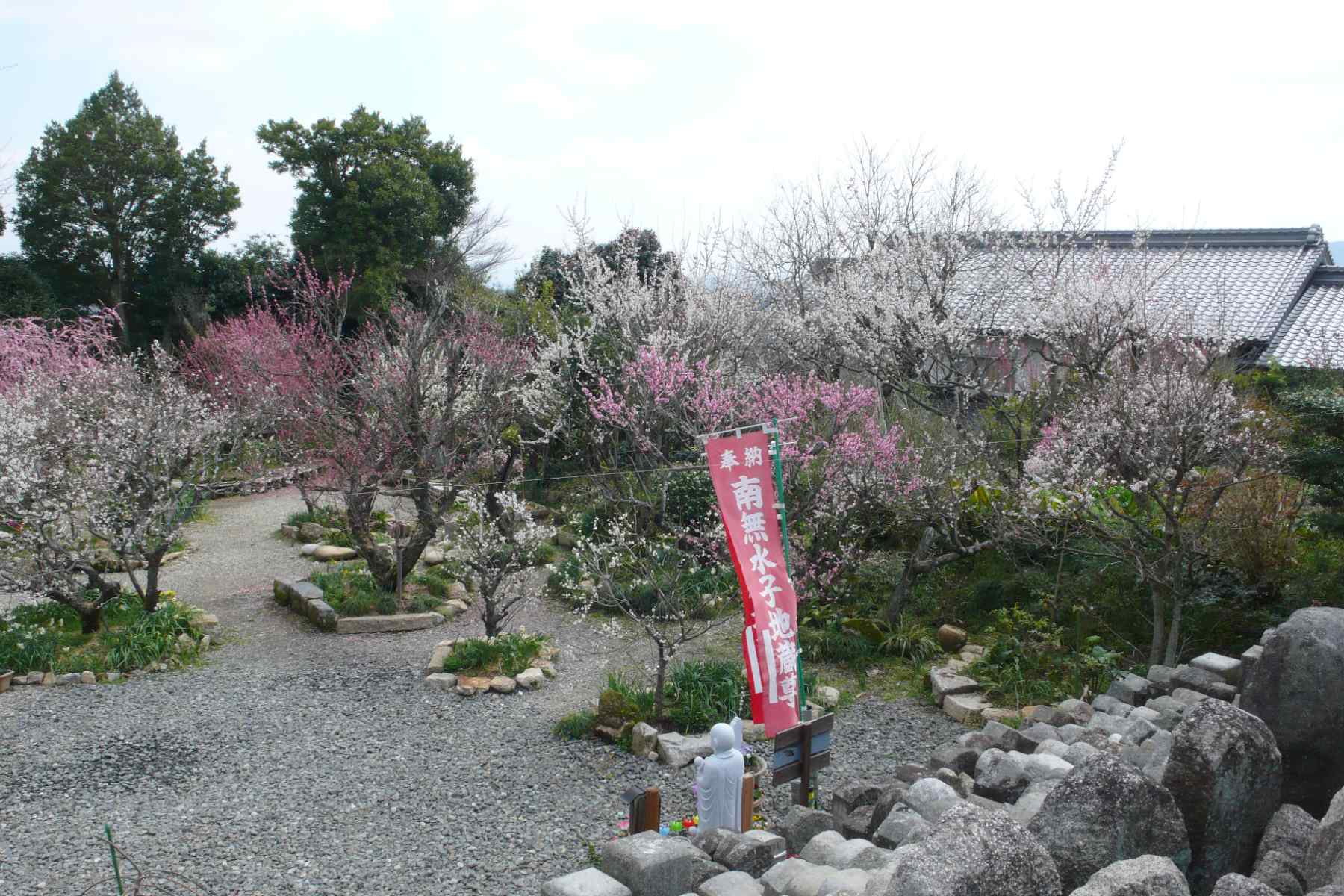 Shinpuku-ji temple at Tsukigase, Nara-shi, Nara-ken, Japan.